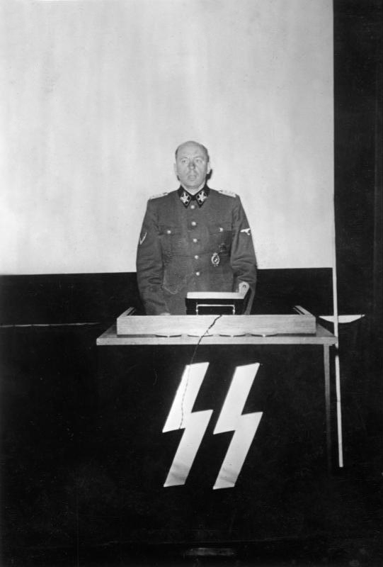 Otto Hofmann Scherl: Holland: Der SS-Gruppenführer Hofmann, Chef des Rassen und Siedlungshauptamtes SS, spricht vor Männern der niederländischen SS, der Waffen SS, sowie vor Führerinnen des Arbeitsdienstes. U.B.z.: SS Gruppenführer Hofman während des Vortrages. SS-PK Aufnahme: Kriegsberichter: Fritz 4041-42 "Fr." "Fr.OK" Juli 42 Zentralbild Juli 1942 Der SS-Gruppenführer Hofmann, Chef des Rassen und Siedlungshauptamtes SS, spricht vor der niederländischen SS, sowie vor Führerinnen des Arbeitsdienstes in Holland. Abgebildete Personen: Hofmann, Otto: Leiter des Rassen- und Siedlungshauptamtes der SS, Deutschland